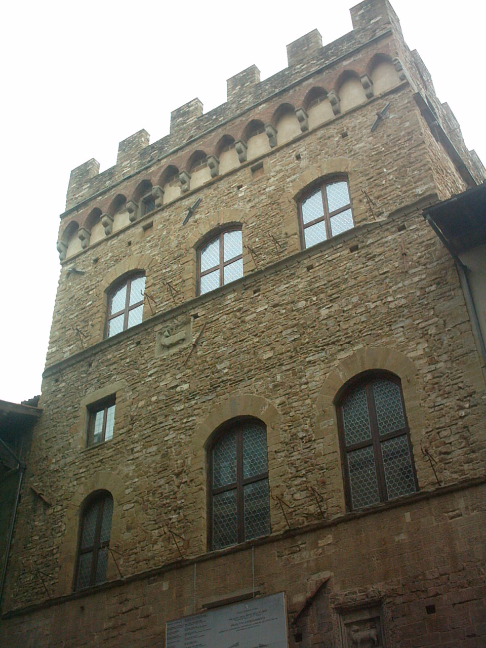 Palazzo dell'arte della Lana a Firenze visto da Via Calimala